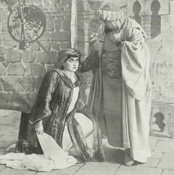 María Guerrero y Emilio Thuillier en una escena de la obra de teatro El alcázar de las perlas, de Francisco Villaespesa (1911).